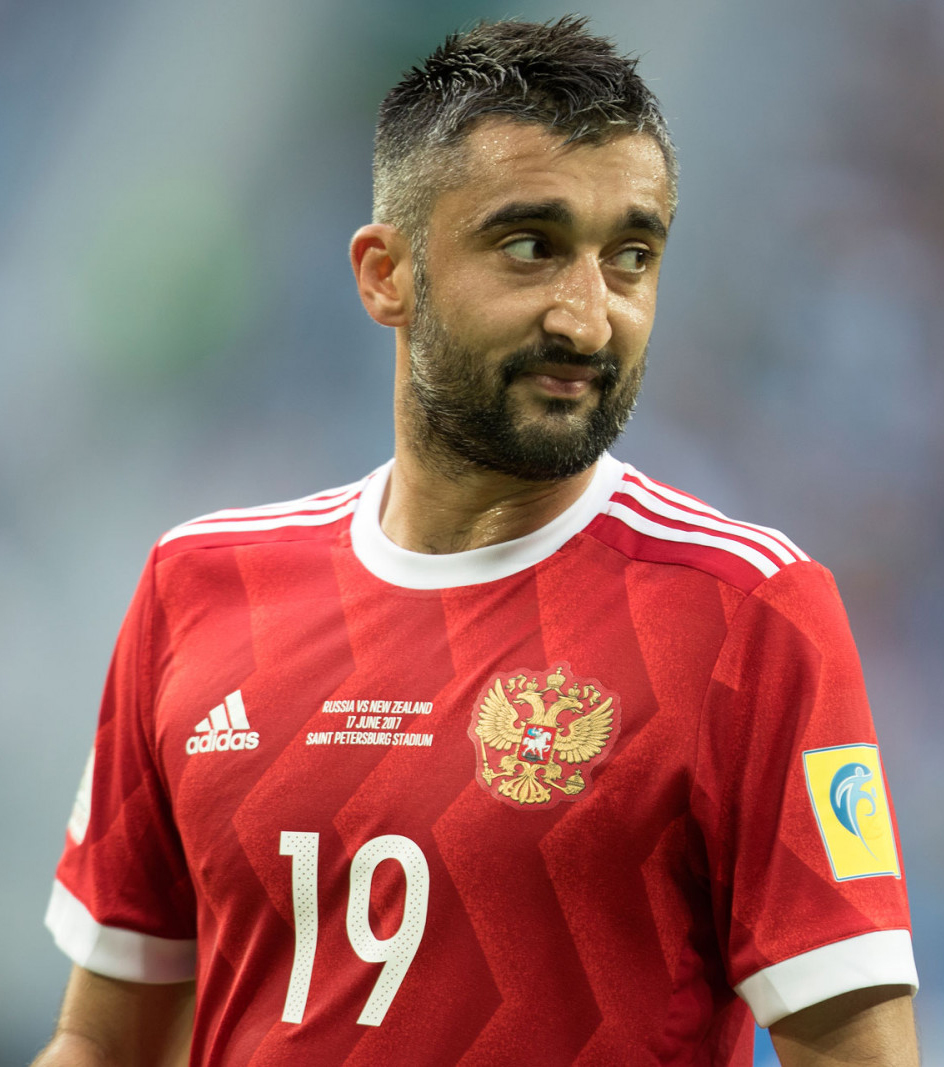 Россия - Новая Зеландия